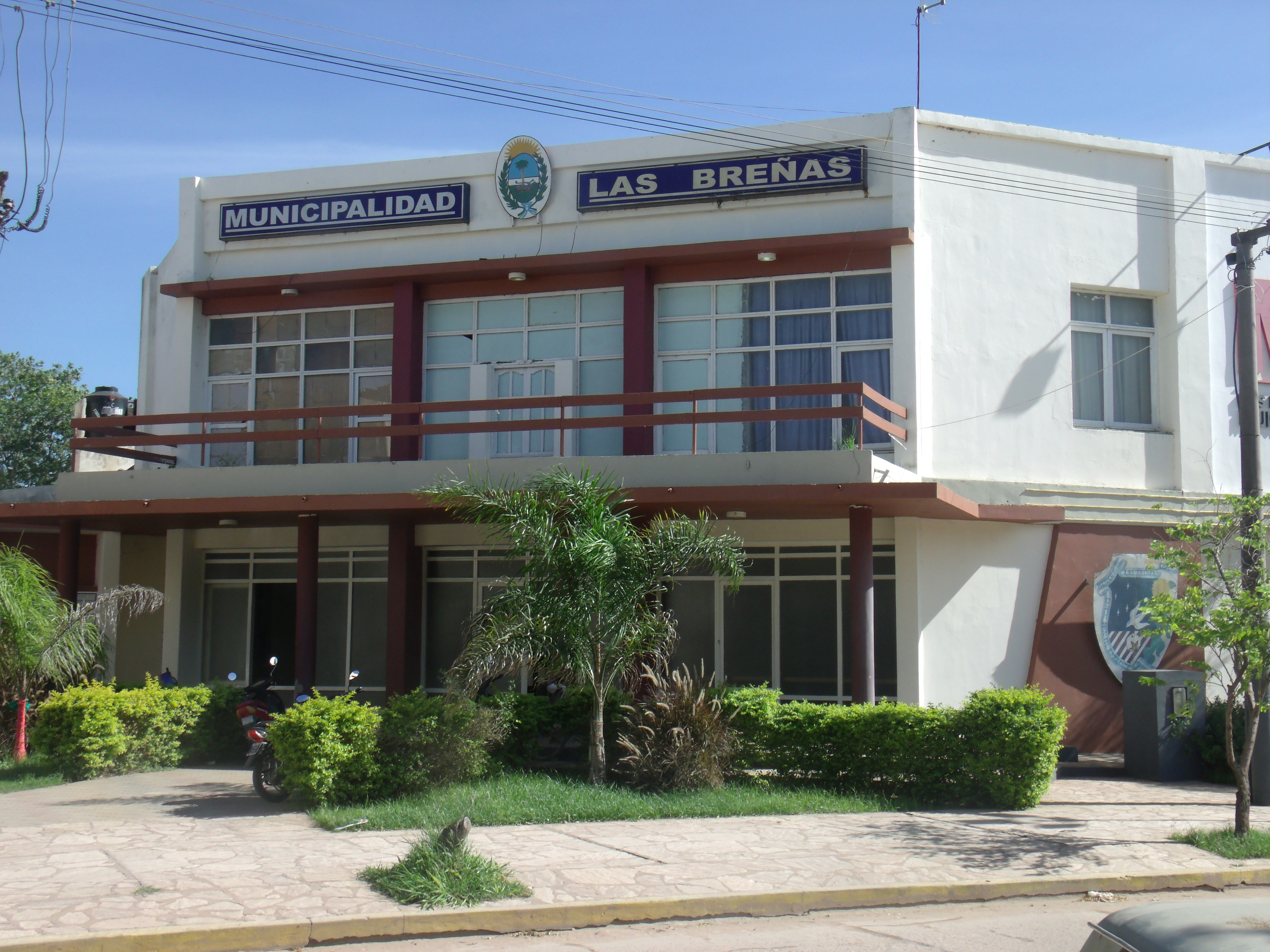 Fachada de la Municipalidad de Las Breñas frente a la plaza Sarmiento